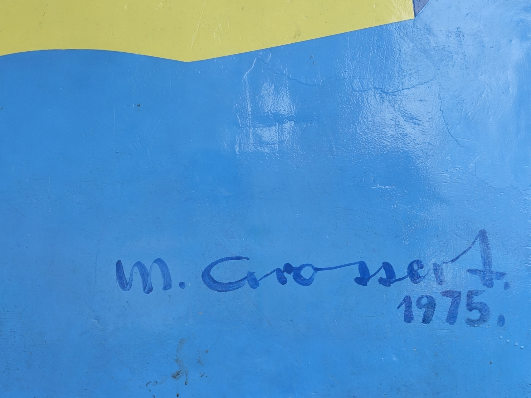 Michael Grossert (1927–2014) Kunststoff Skulptur, Lieu dit, 1975. Unterschrift